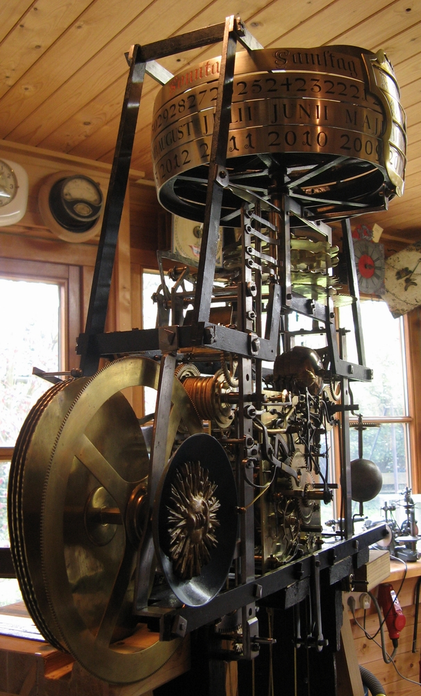 Huesgen-Uhr, Werk